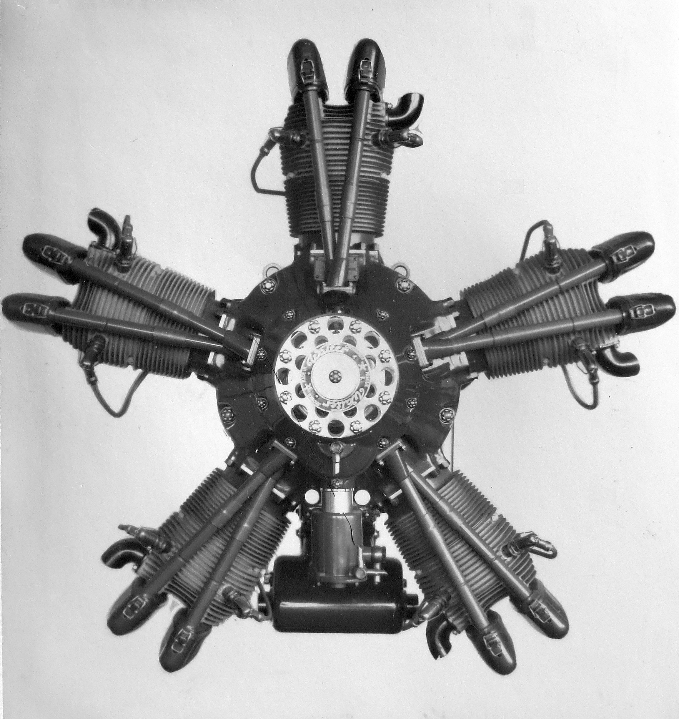 letecký pětiválcový hvězdicový motor